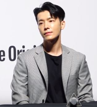 [Dispatch=김미류기자] 유튜브 오리지널 '아날로그 트립(Analog Trip)' 제작발표회가 27일 오전 서울 강남구 삼성동 SMTOWN 코엑스아티움에서 열렸다.